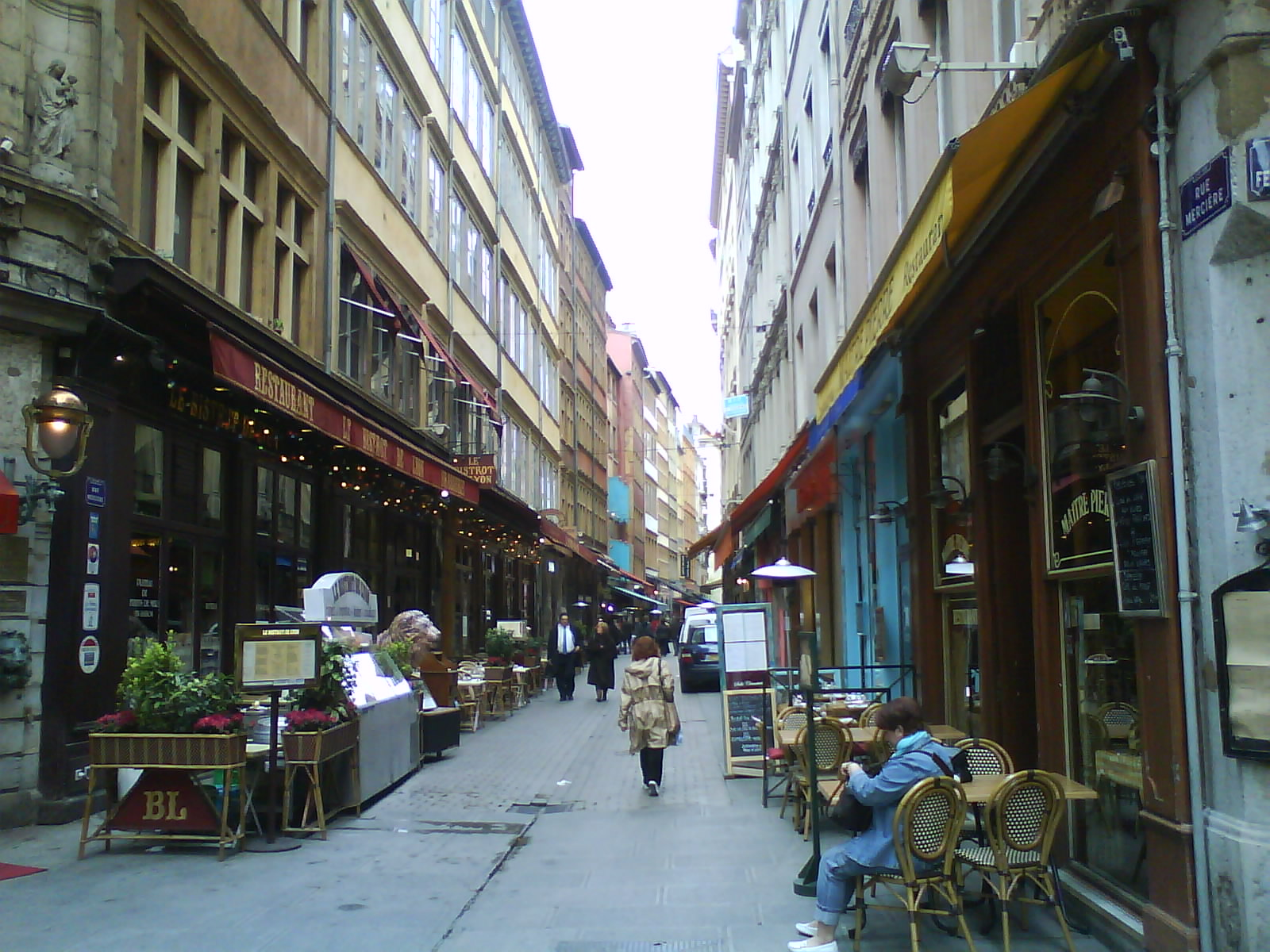 rue mercière Lyon France mars 2008